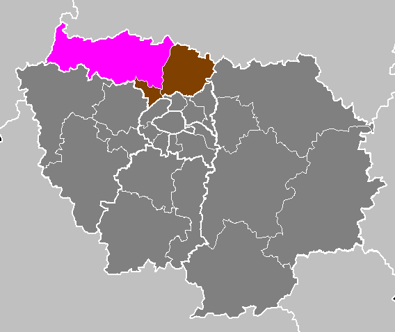 Maps of arrondissements and cantons of France: Département du Val-d Oise - Arrondissement de Pontoise.PNG (Région Île-de-France)